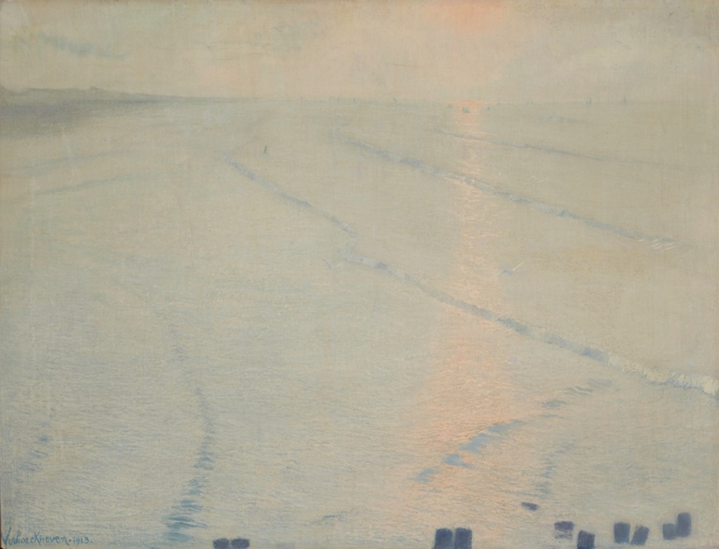 Marguerite Verboeckhoven, Temps clair, 1913, huile sur toile, 49,5 x 65 cm. Musée Charlier, Bruxelles, inv. I-418-1996